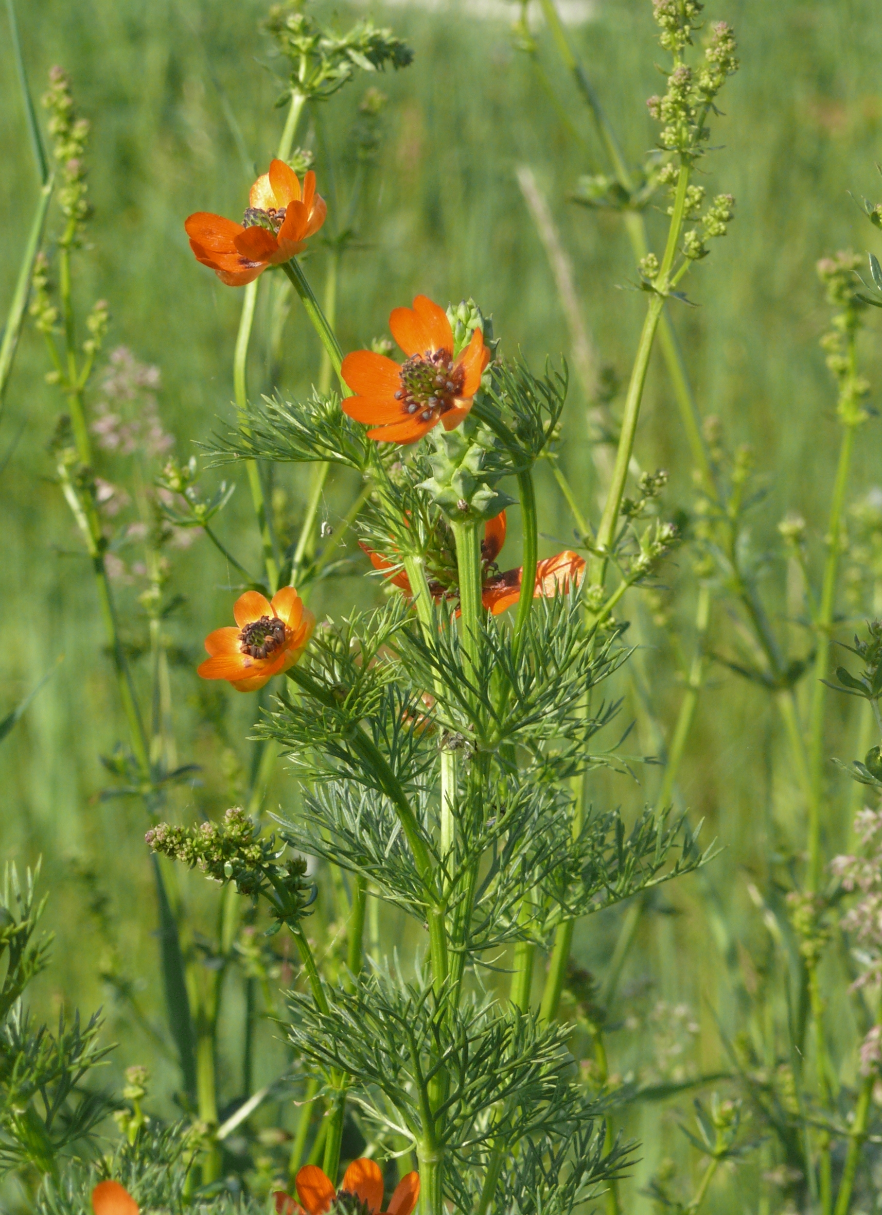 Adonis aestivalis, Tauberland